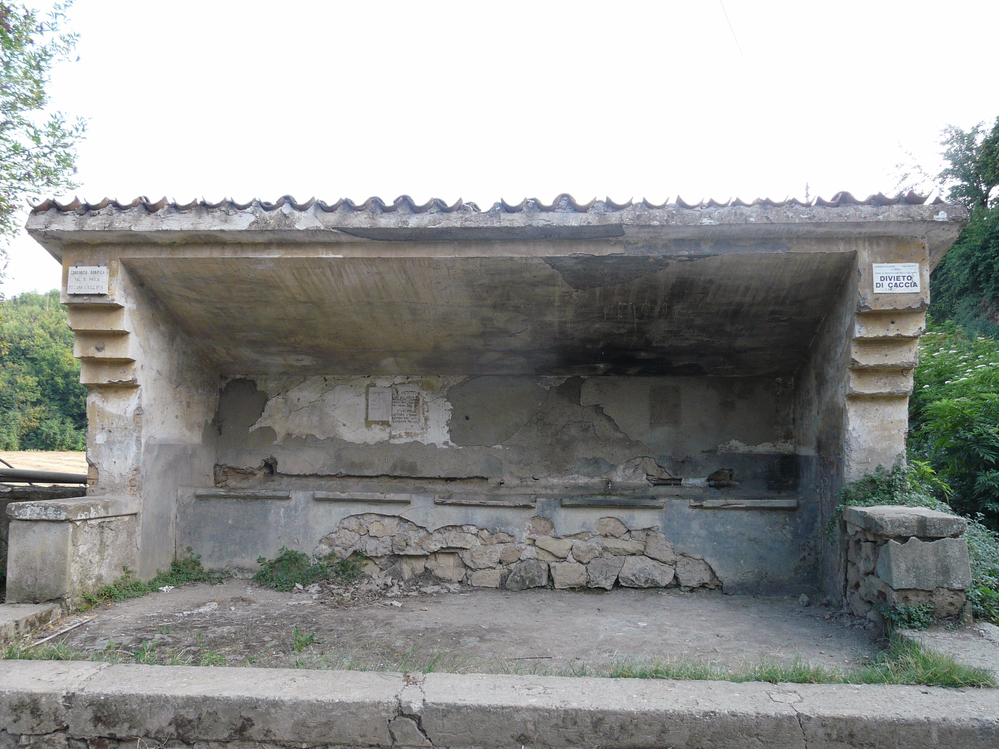 Lavatoio, Grotte di Castro (Frazione Mortaro), Lazio, Italia